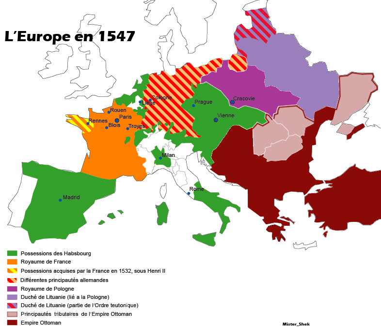 Carte de l'Europe en 1547. Il s'agit de voir l'étendue des possessions des Habsbourgs dans le contexte de son apogée.